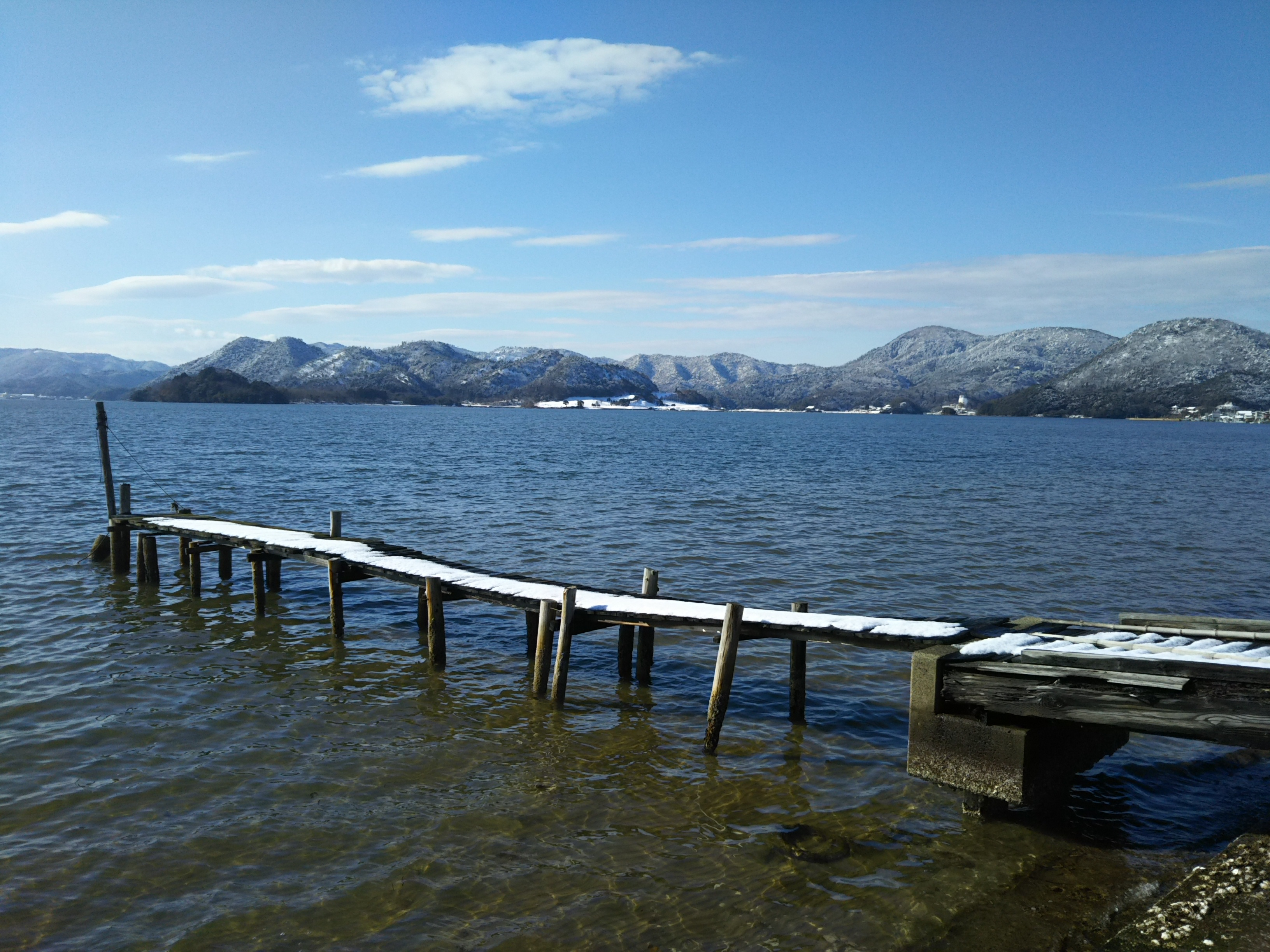 久美浜湾（京都府京丹後市久美浜町）